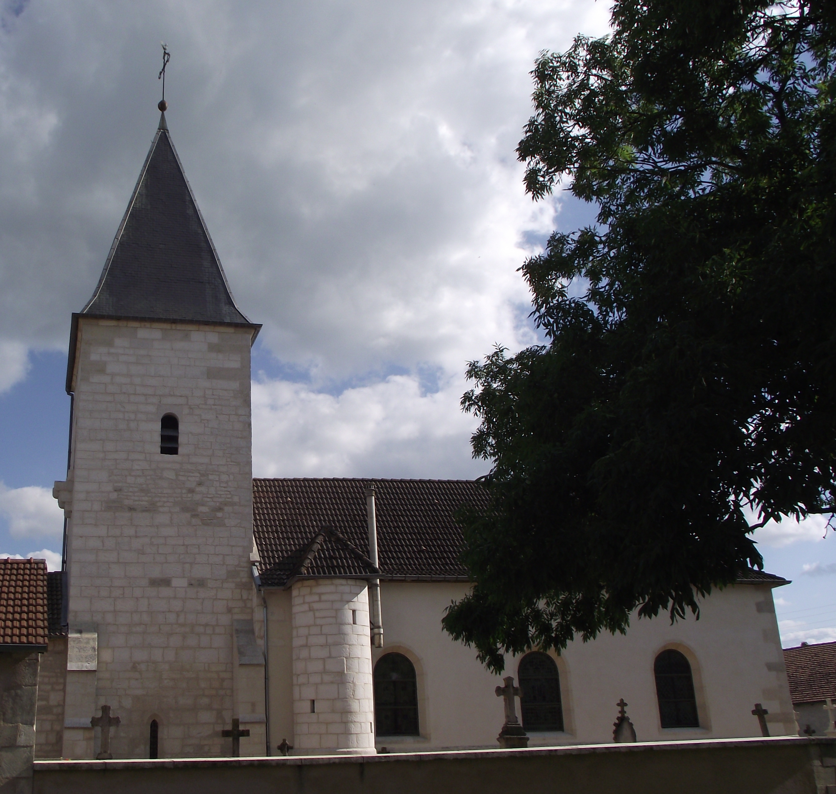 Eglise Burey-la-Cote